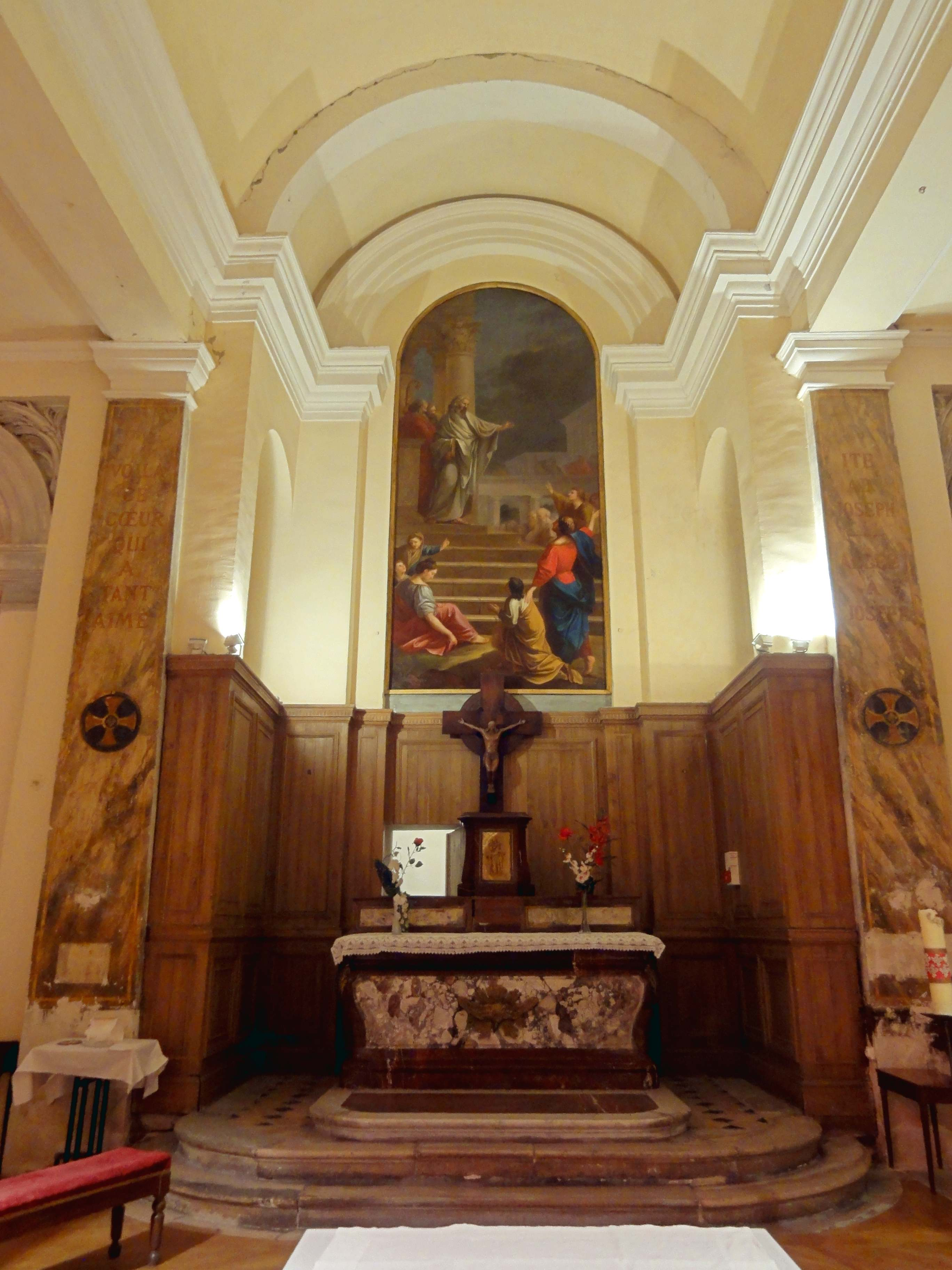 Intérieur de l'église - voir titre.